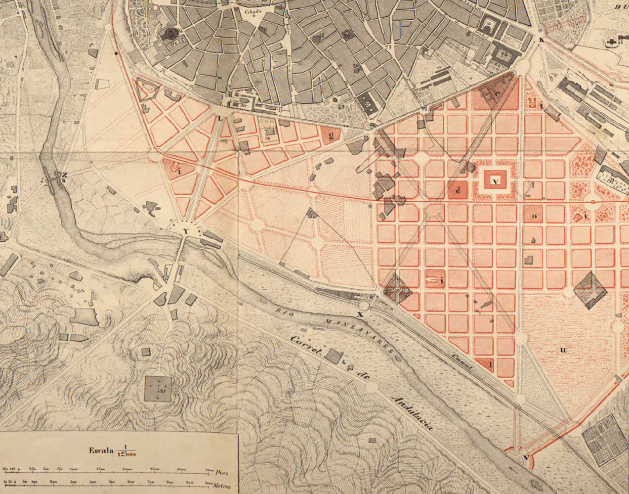 Ensanche de Madrid : anteproyecto. Plano general de la zona de Ensanche y del emplazamiento y distribución del nuevo caserio, ejecutado por Real orden de 8 de Abril de 1857 Carlos Mª de Castro ; F. Perez Baquero grabó